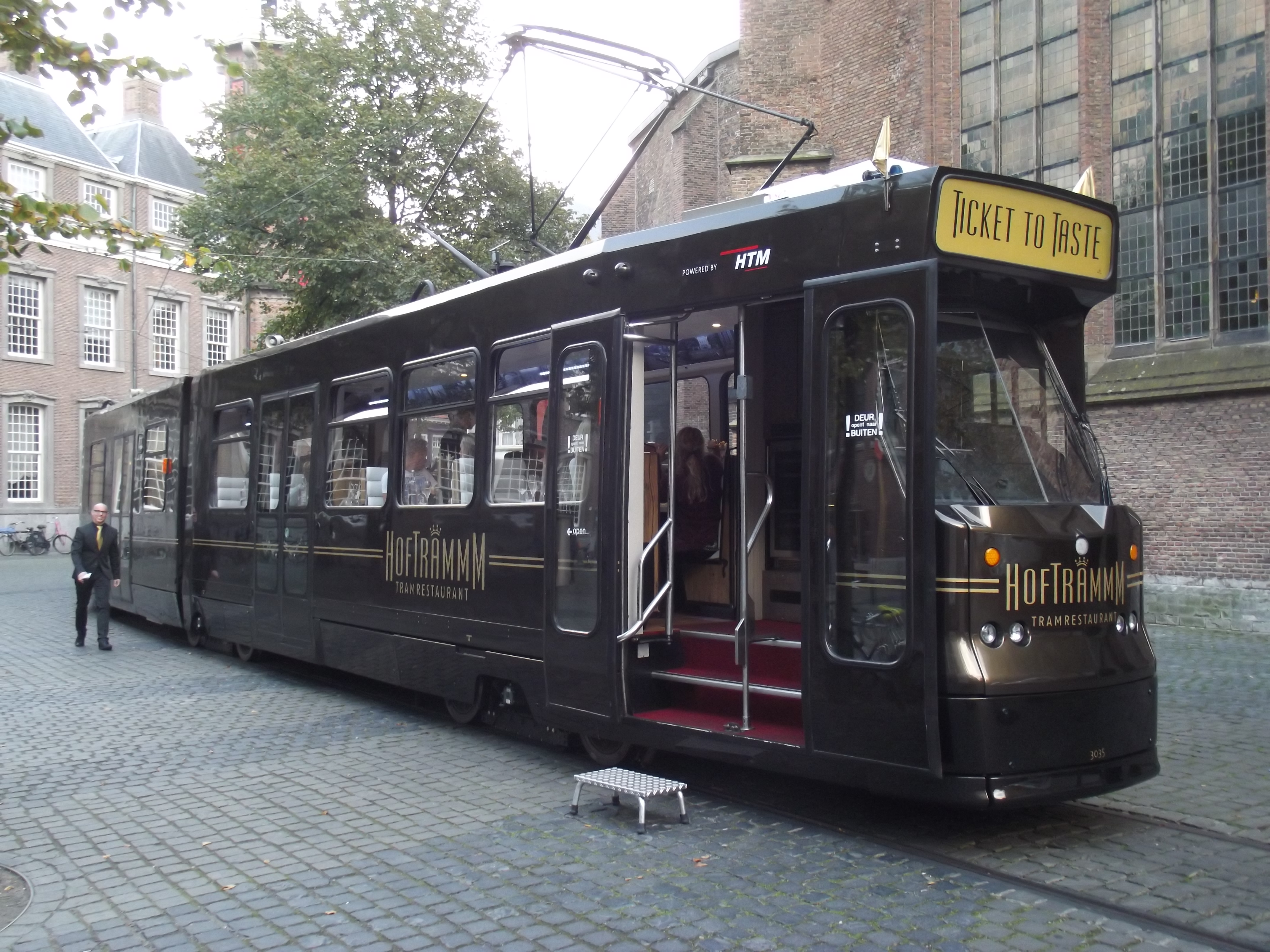 Een GTL omgebouwde restauranttram "Hoftrammm" op de keerlus bij de grote kerk. Het vertrekpunt voor het gezelschap.